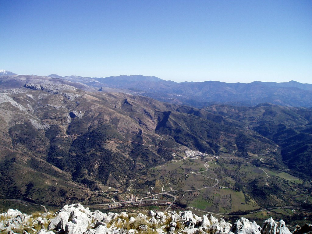 Jimera de Líbar, Málaga, Spain.